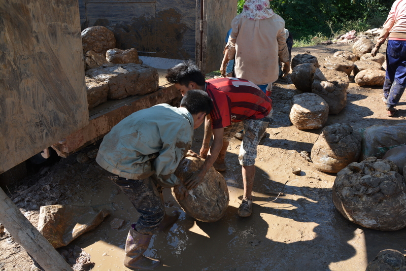 ルアンナムターです。